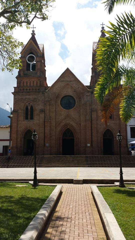 La igesia es considerada, después de la Catedral de Medellín, como la más grande construida en ladrillo macizo en Antioquia.